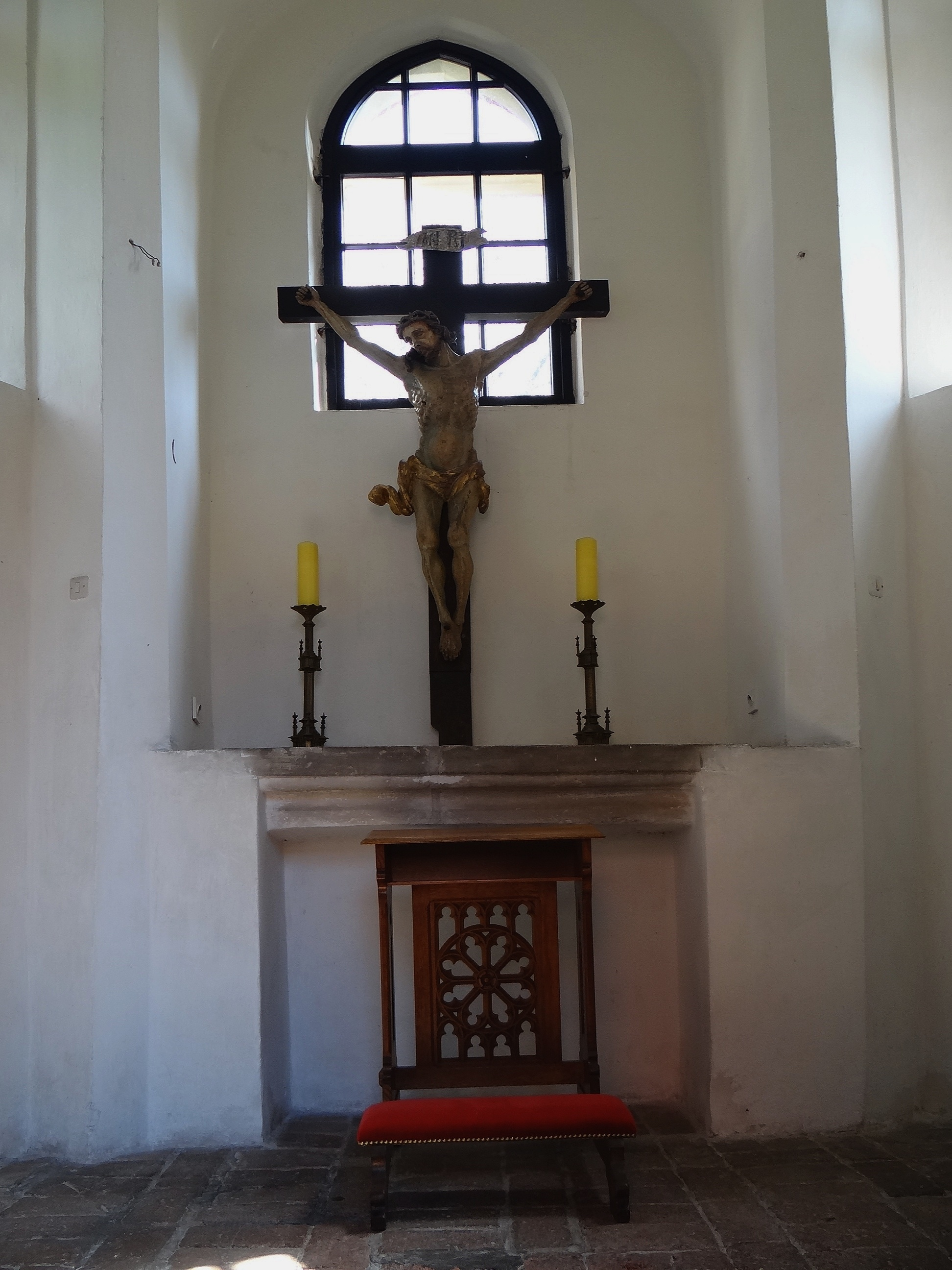 Oporów, zamek, 1434-1449, 1657, 1962-65